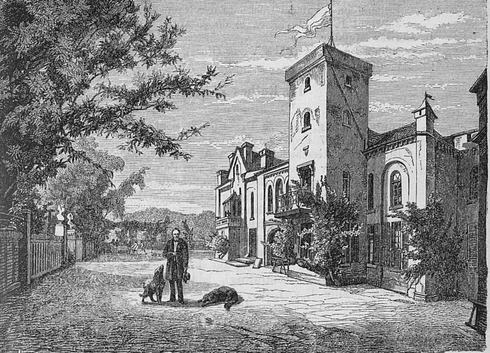 Fahnenburg von Südwest gesehen, Düsseldorf-Ludenberg, um 1873